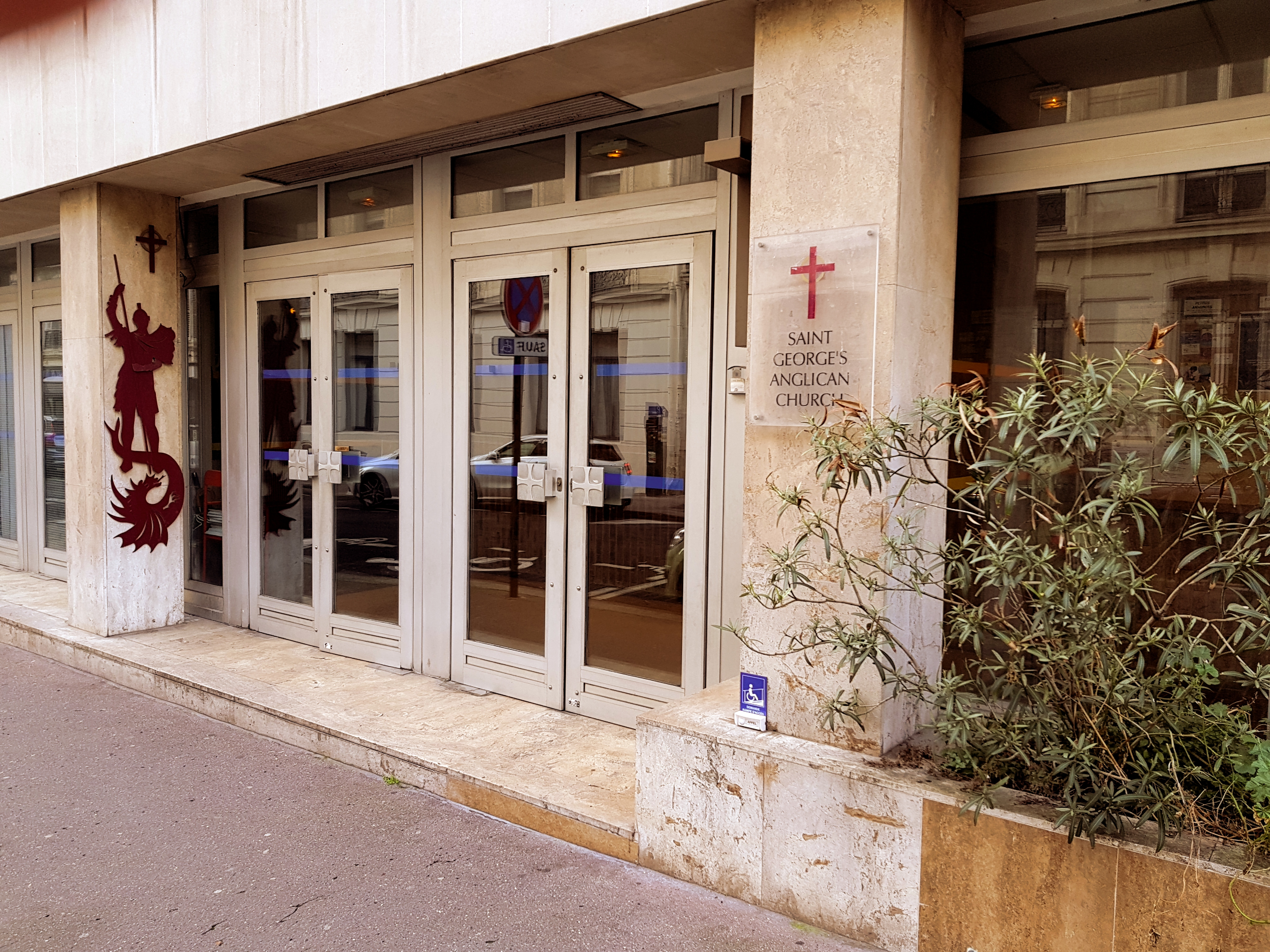 Eglise anglicane Saint-Georges, 7 rue Auguste-Vacquerie, Paris 16e.